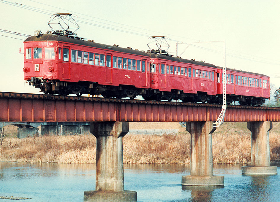 名古屋鉄道 755+704+232?